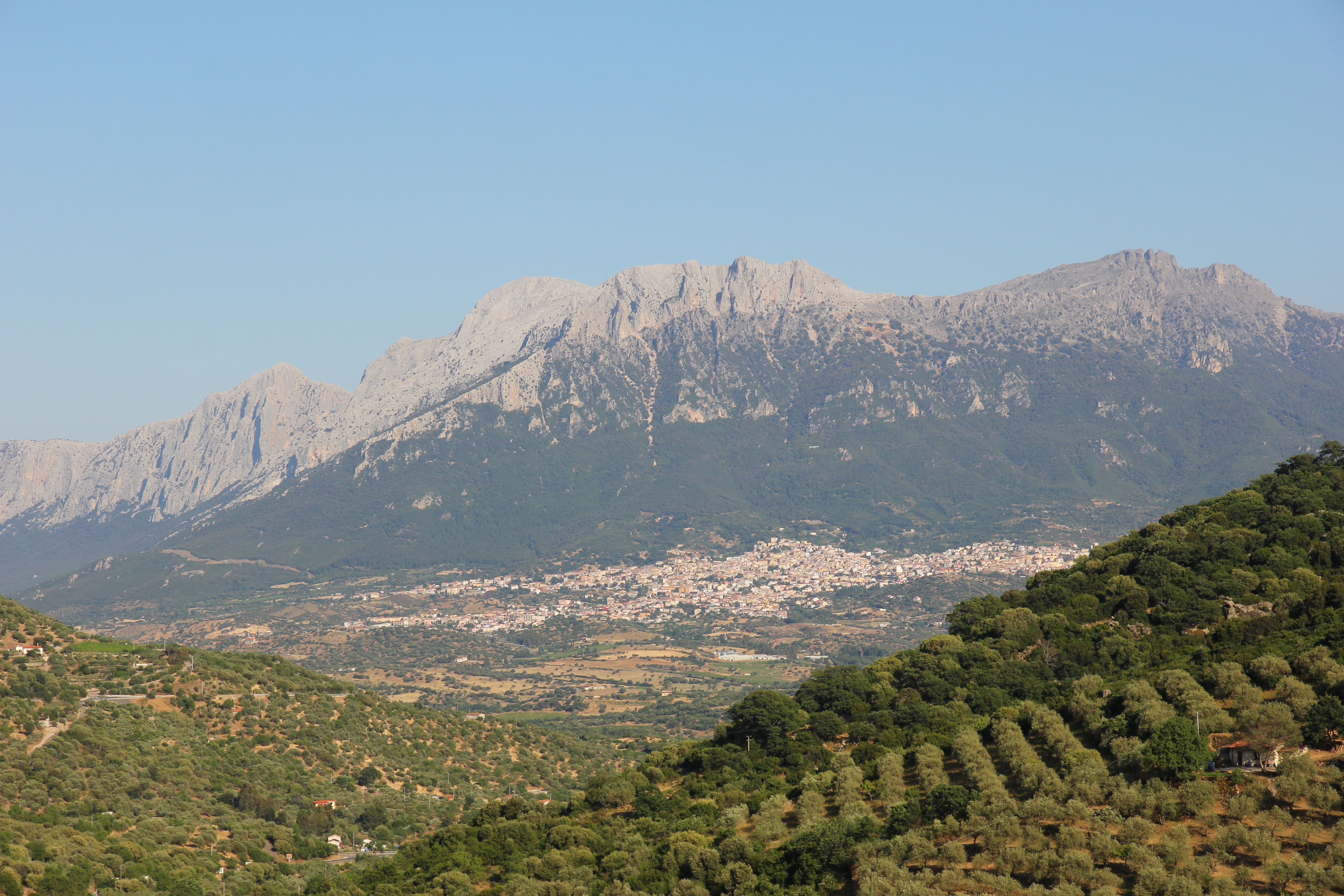 Oliena - Monte Corrasi